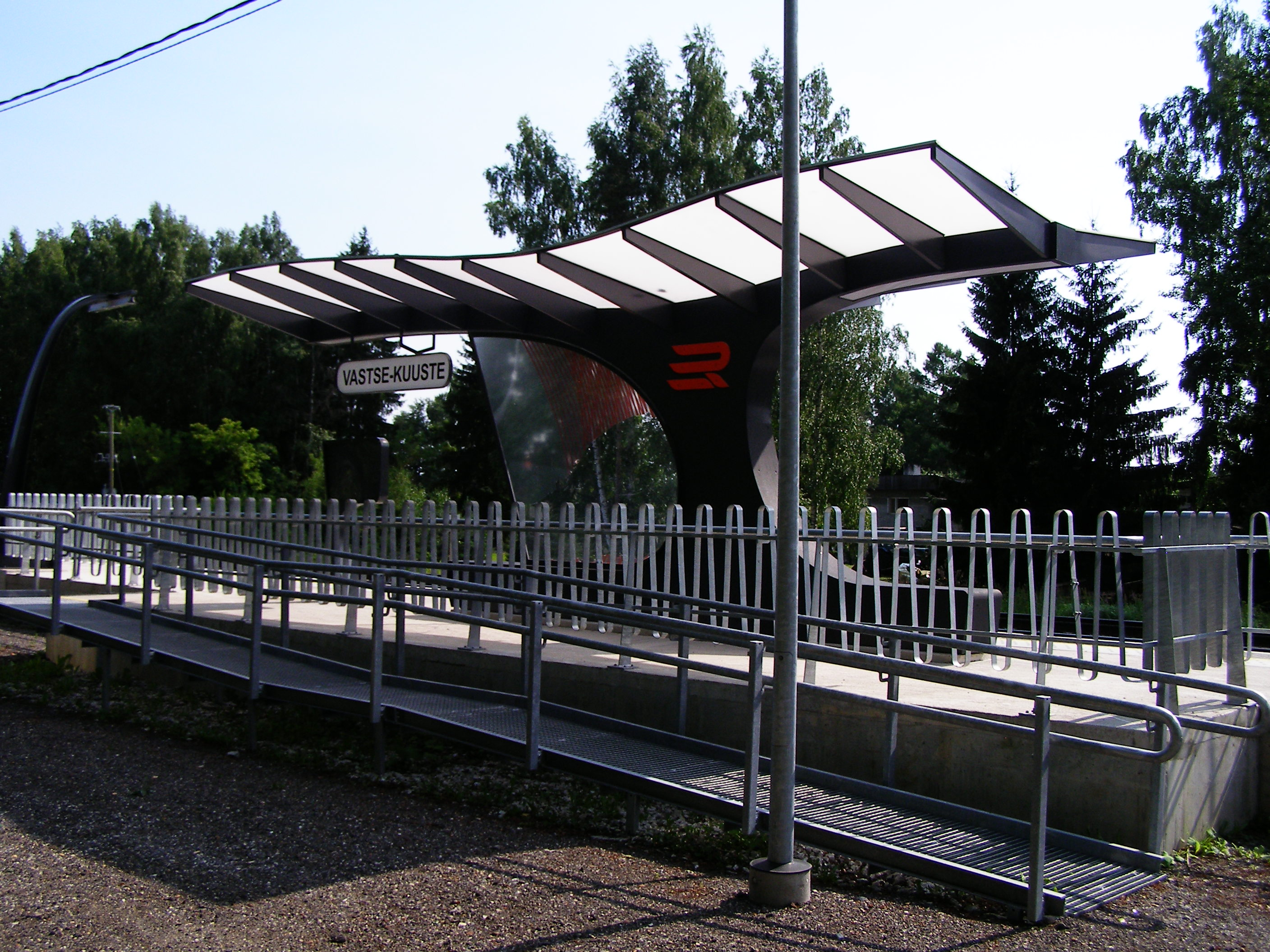 Vastse-Kuuste raudteejaama perroon